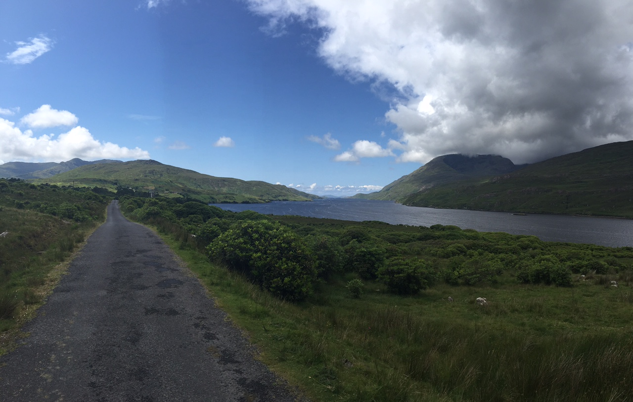 An Rand der Killary Harbour auf dem Wild Atlantic Way